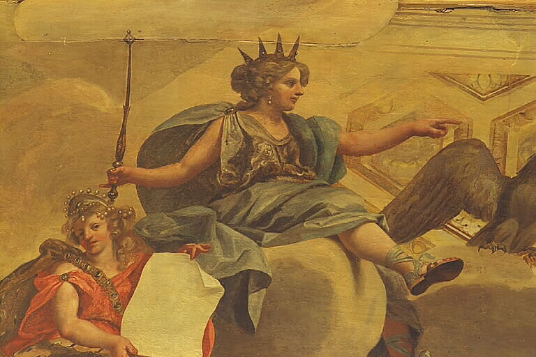 Slottets trapphus, takmålning av Johan Sylvius. Motiv: Drottningholm Nyckelord: Byggnadsminnen:Statl, Världsarv Kategori: Slott Slottets trapphus, takmålning av Johan Sylvius.